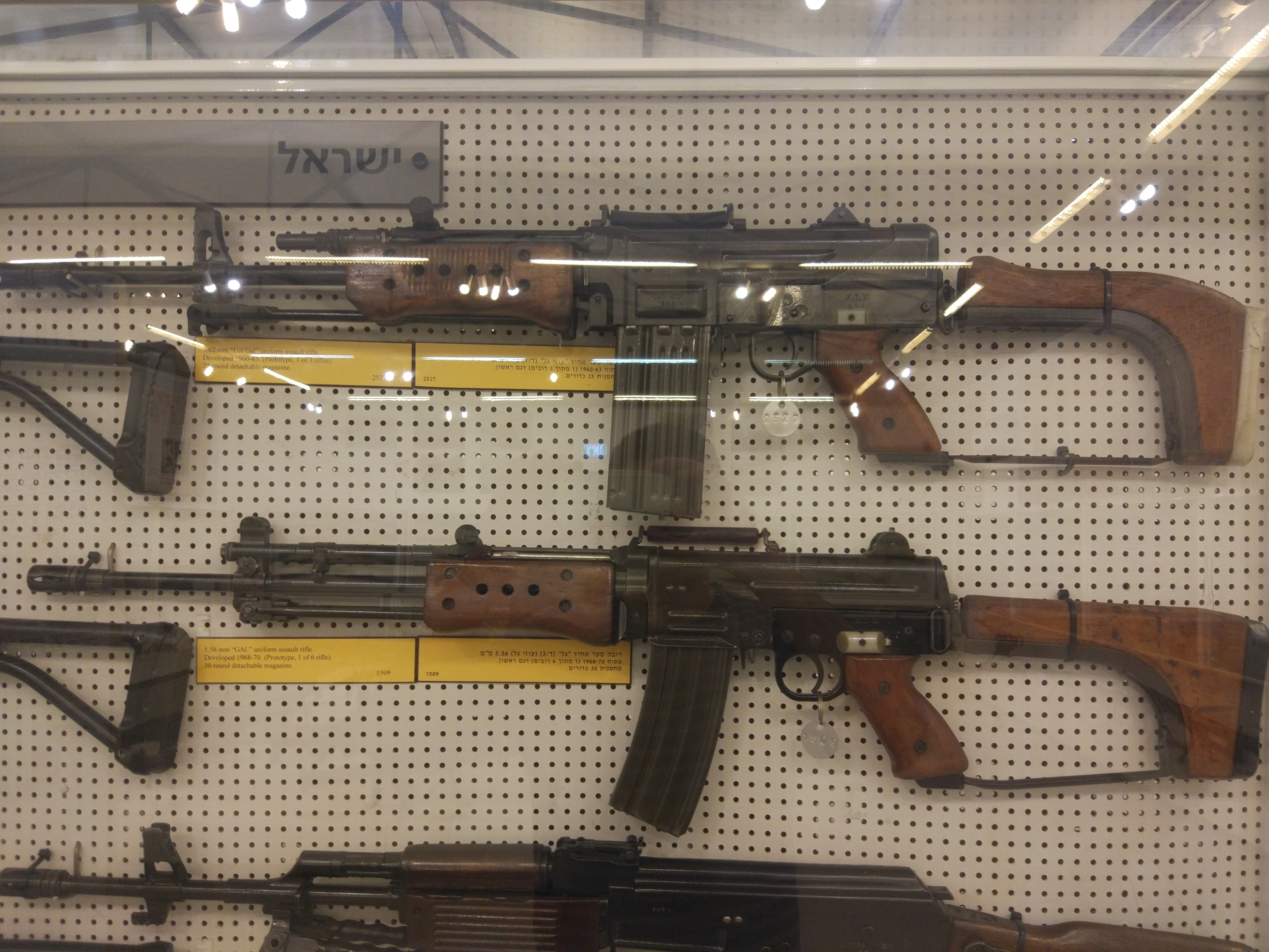 רוס"ר "גל" שתכנן עוזי גל. צולם במוזיאון בתי האוסף בתל אביב